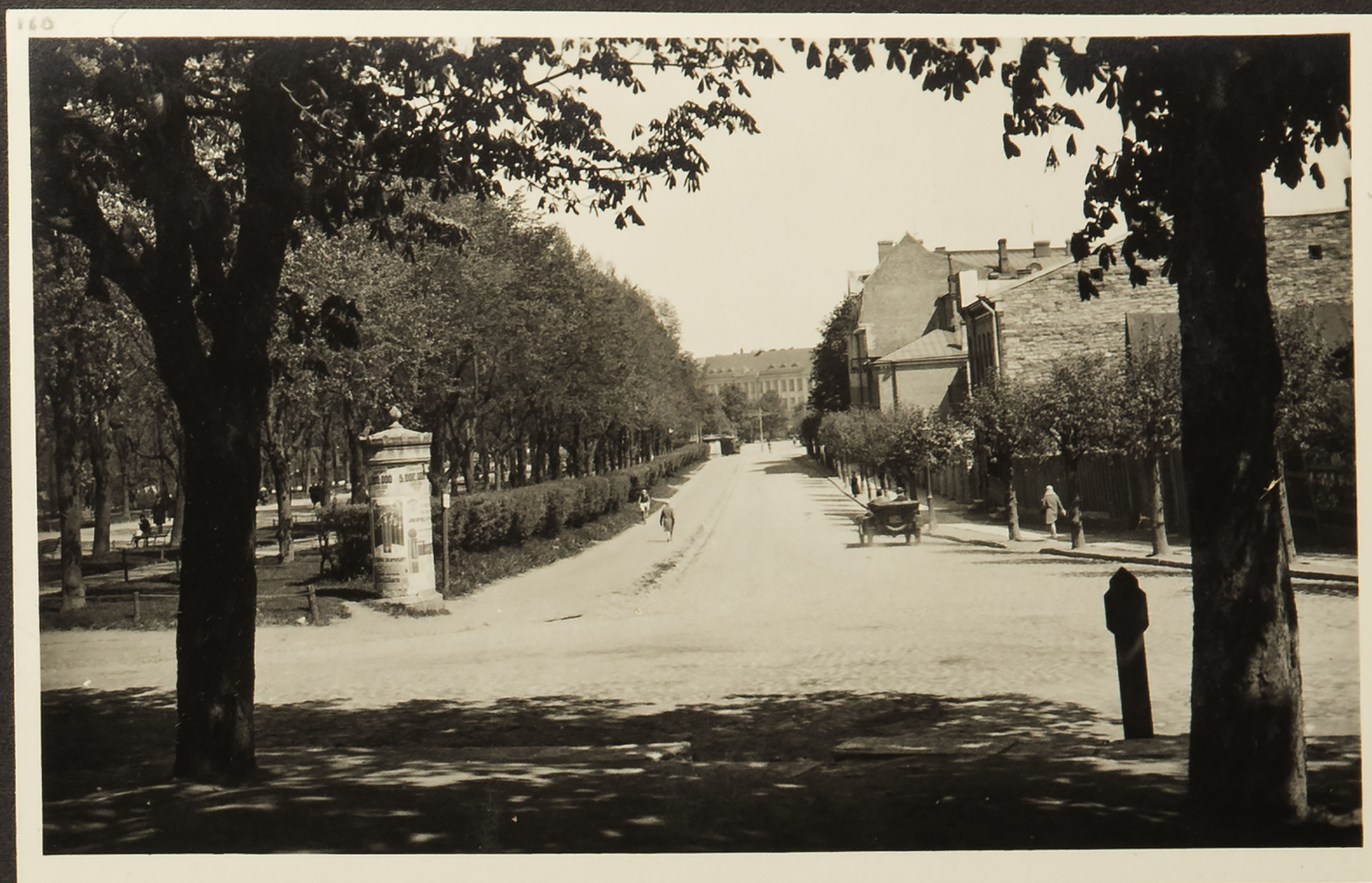 Kaarli puiestee suunaga Vabaduse väljaku poole (Karlstrasse)